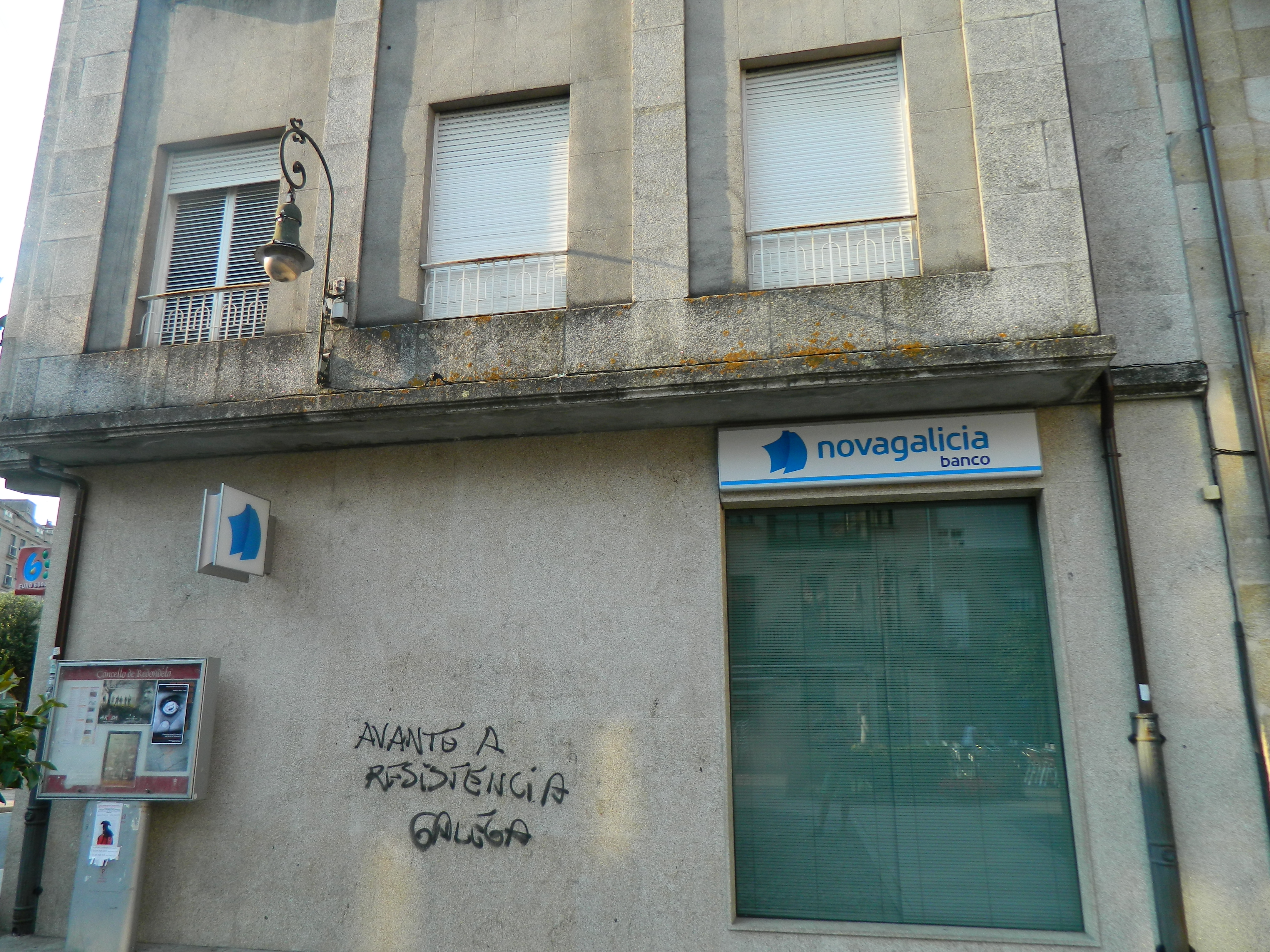 Pintada de Resistencia Galega na sucursal de Novagalicia Banco de Redondela.